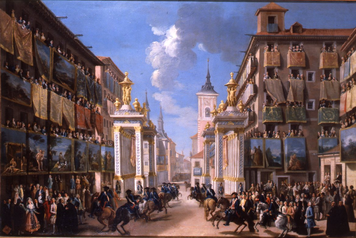 Lorenzo Quirós, Ornatos en la calle Platería (calle Mayor) con motivo de la entrada de Carlos III en Madrid, Museo de Historia de Madrid, depósito de la Real Academia de San Fernando.